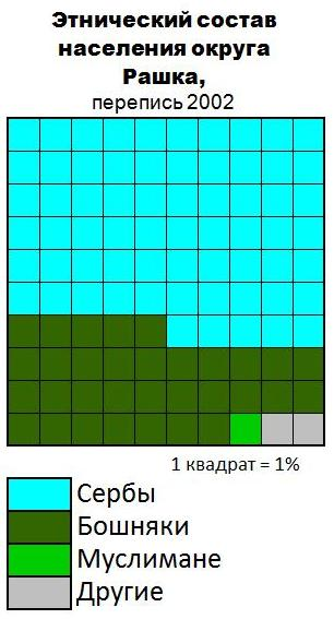 Этнический состав населения округа Рашка (Сербия)